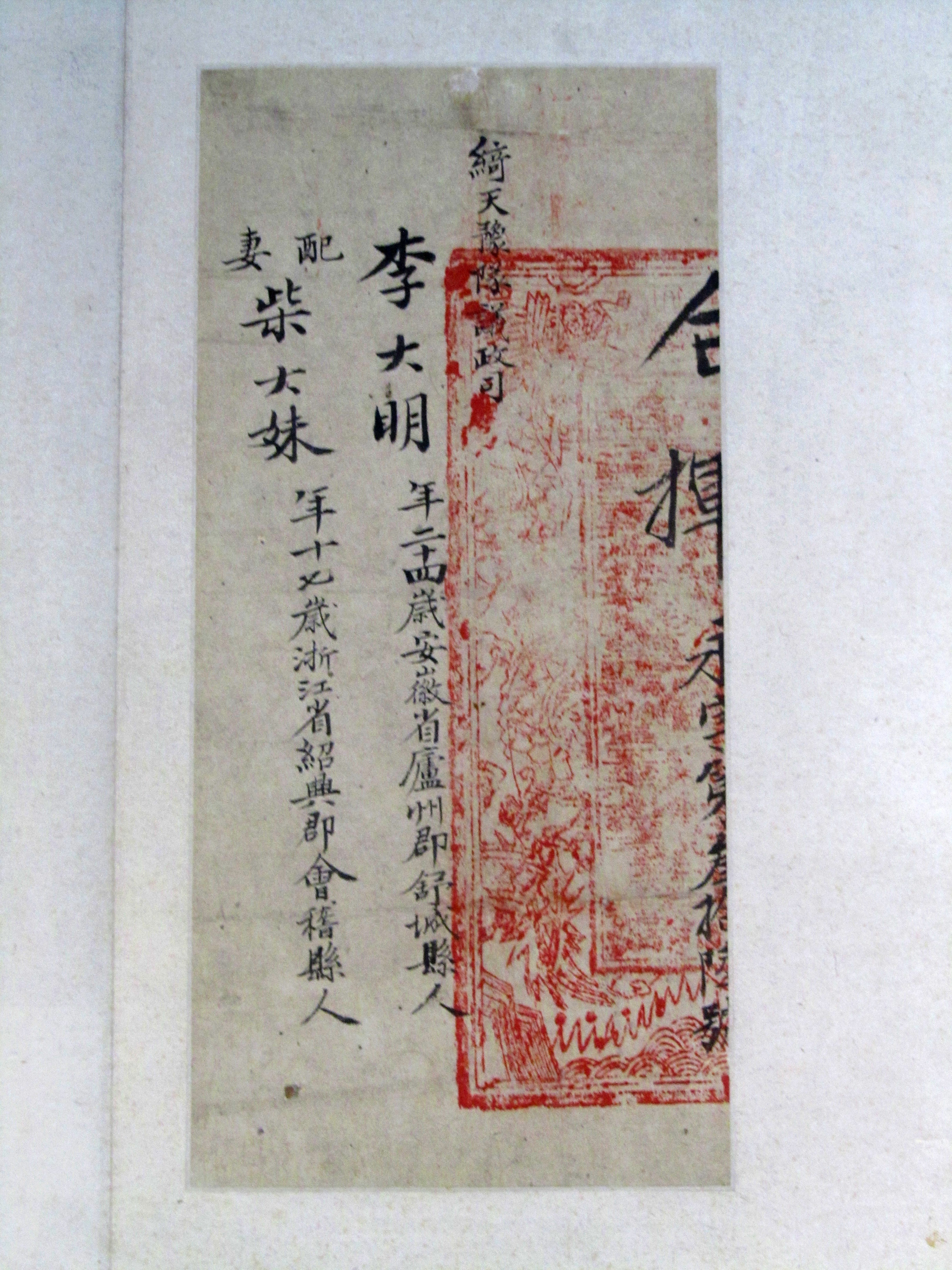 太平天国李大明柴大妹合挥，浙江省博物馆武林馆区藏。